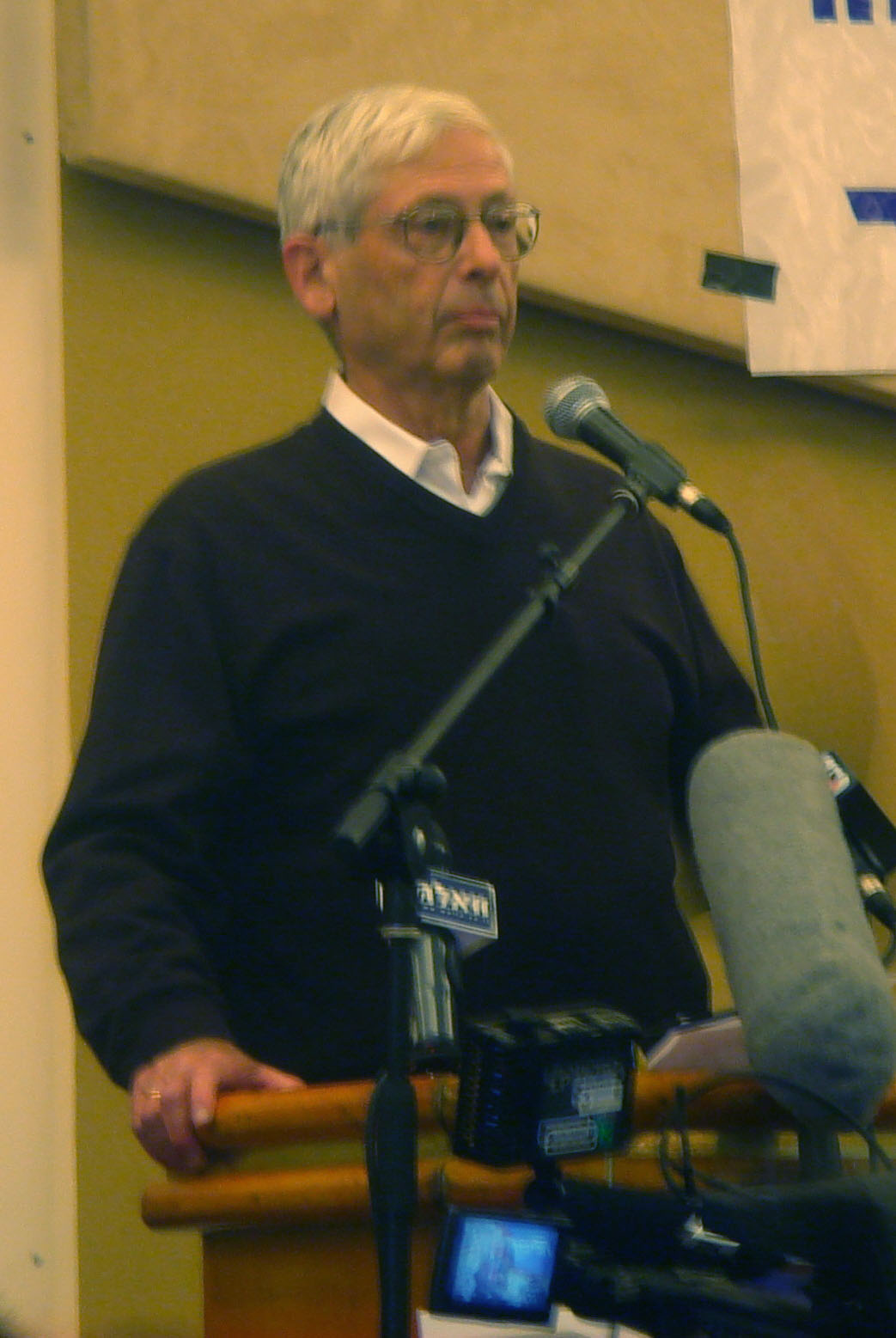 Ze'ev Benyamin Begin.